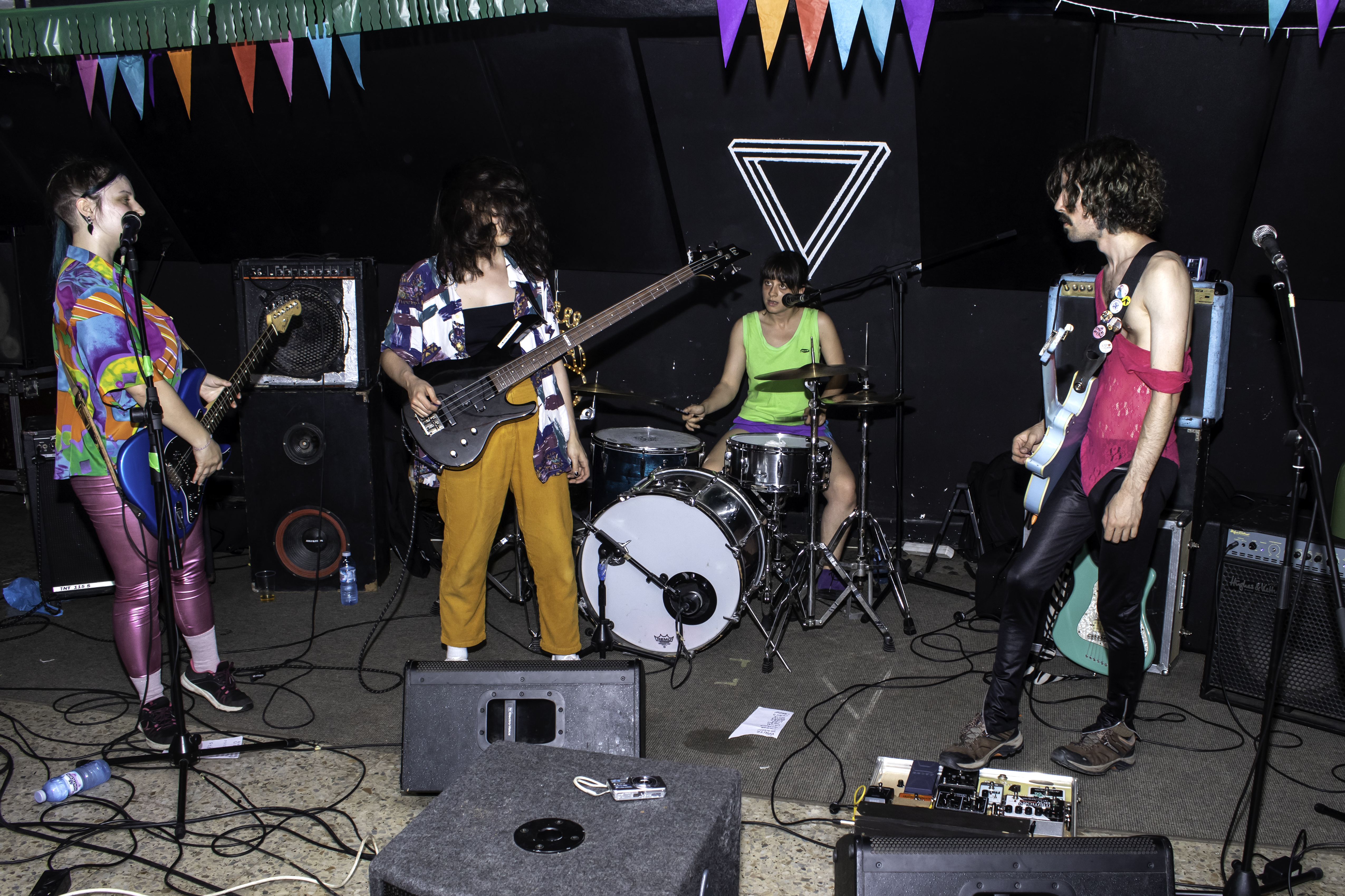 O grupo galego Contenedor de Mierda na Gran Romaría Galician Bizarre, no Liceo Mutante de Pontevedra.